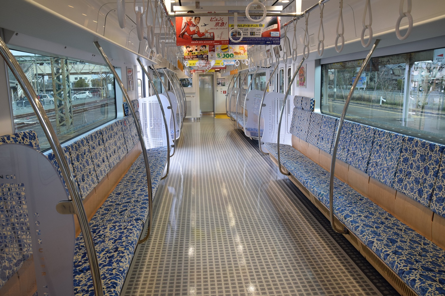 荒尾駅にて撮影